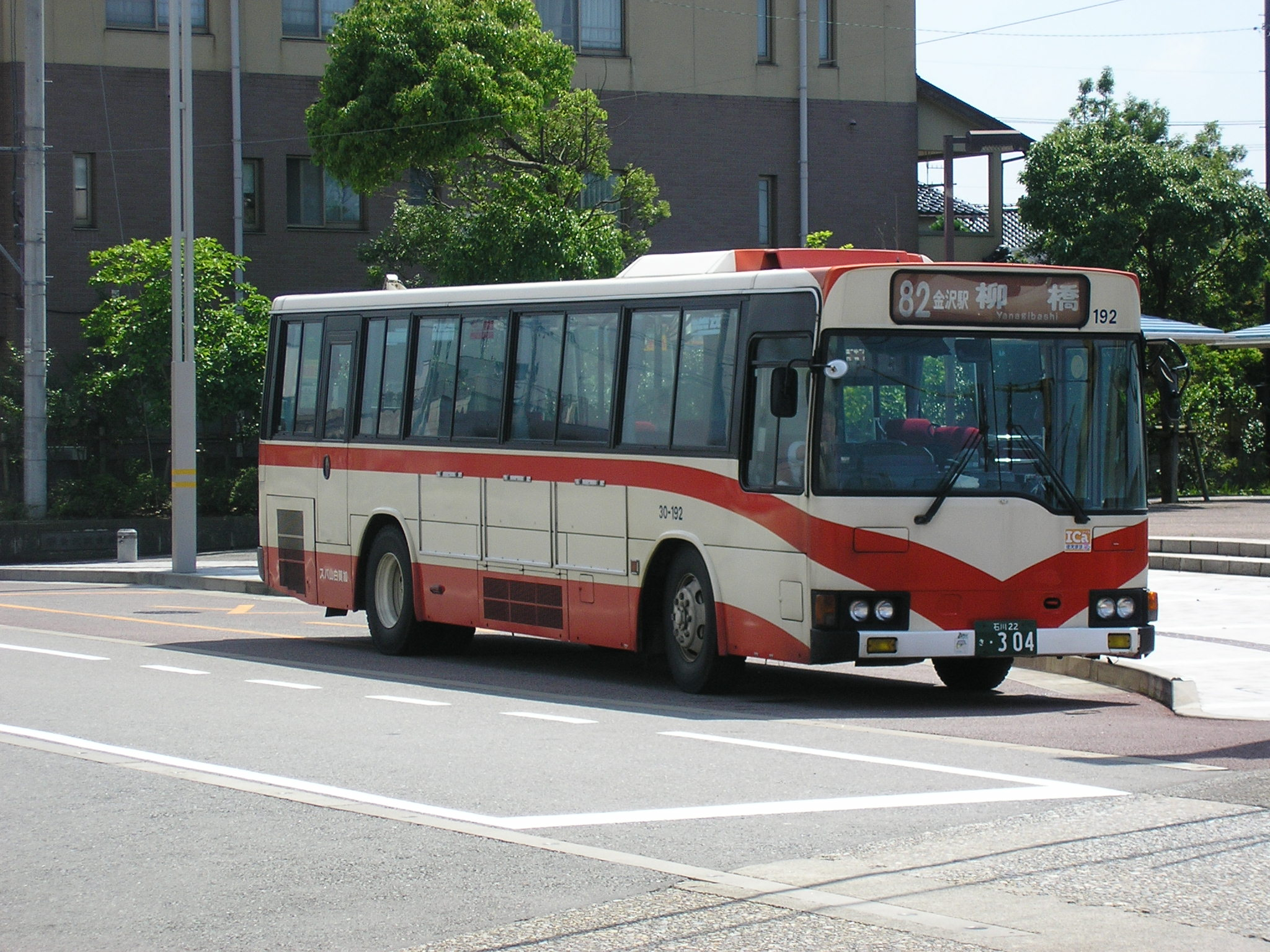 2006年7月に投稿者が撮影。